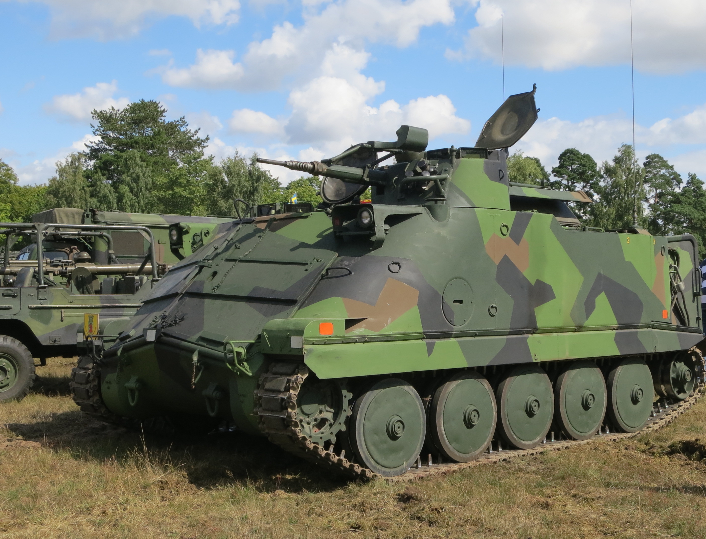 Pansarbandvagn 302 vid Regementets Dag på P7 Revingehed